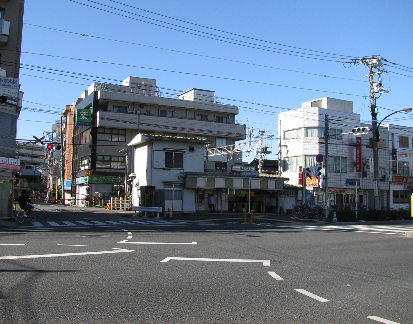 東武亀戸線東あずま駅